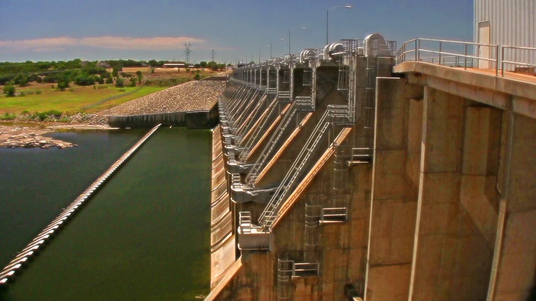 De Cordova Bend Dam